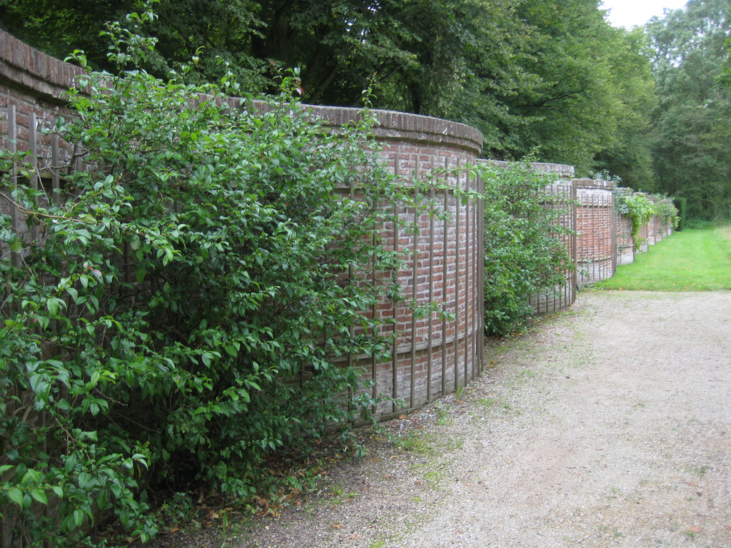 506982 slangemuur Beeckestijn